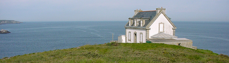 La maison-feu de la Pointe du Millier (le feu a été allumé pour la première fois en 1881).